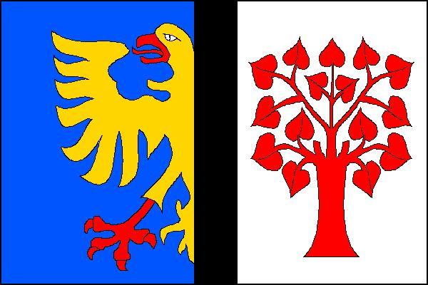 Vlajka města Orlová